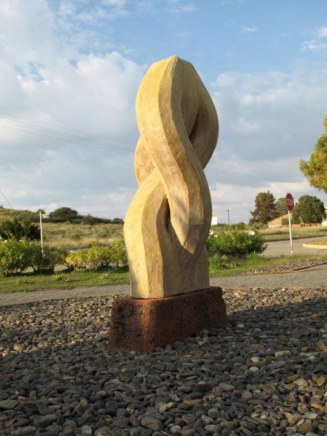 Orania Koeksuster Sculpture